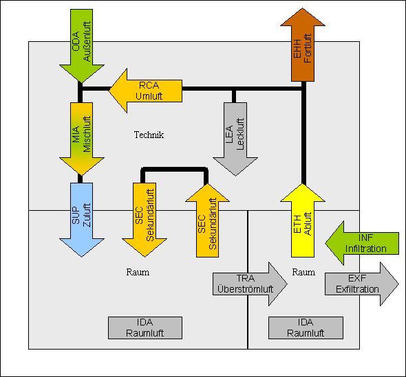 Luftarten in Anlehnung an DIN EN 13779